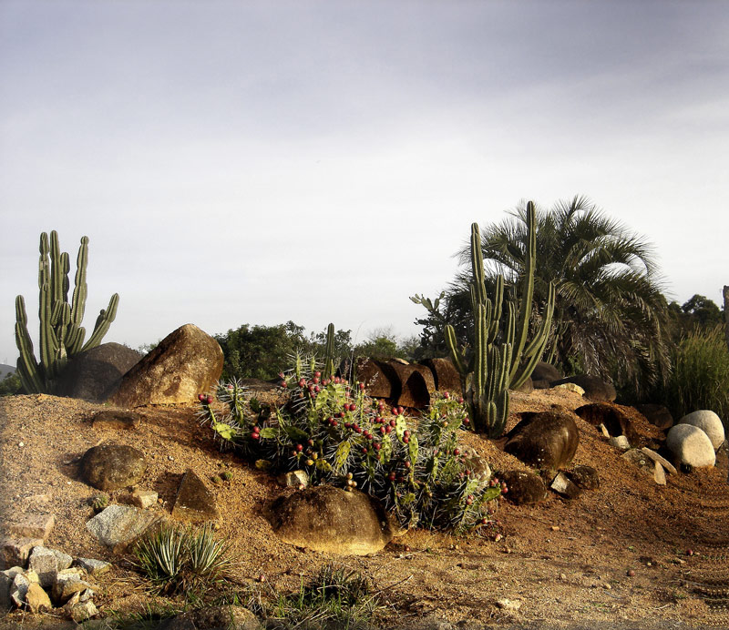 Jardim Botânico de Porto Alegre